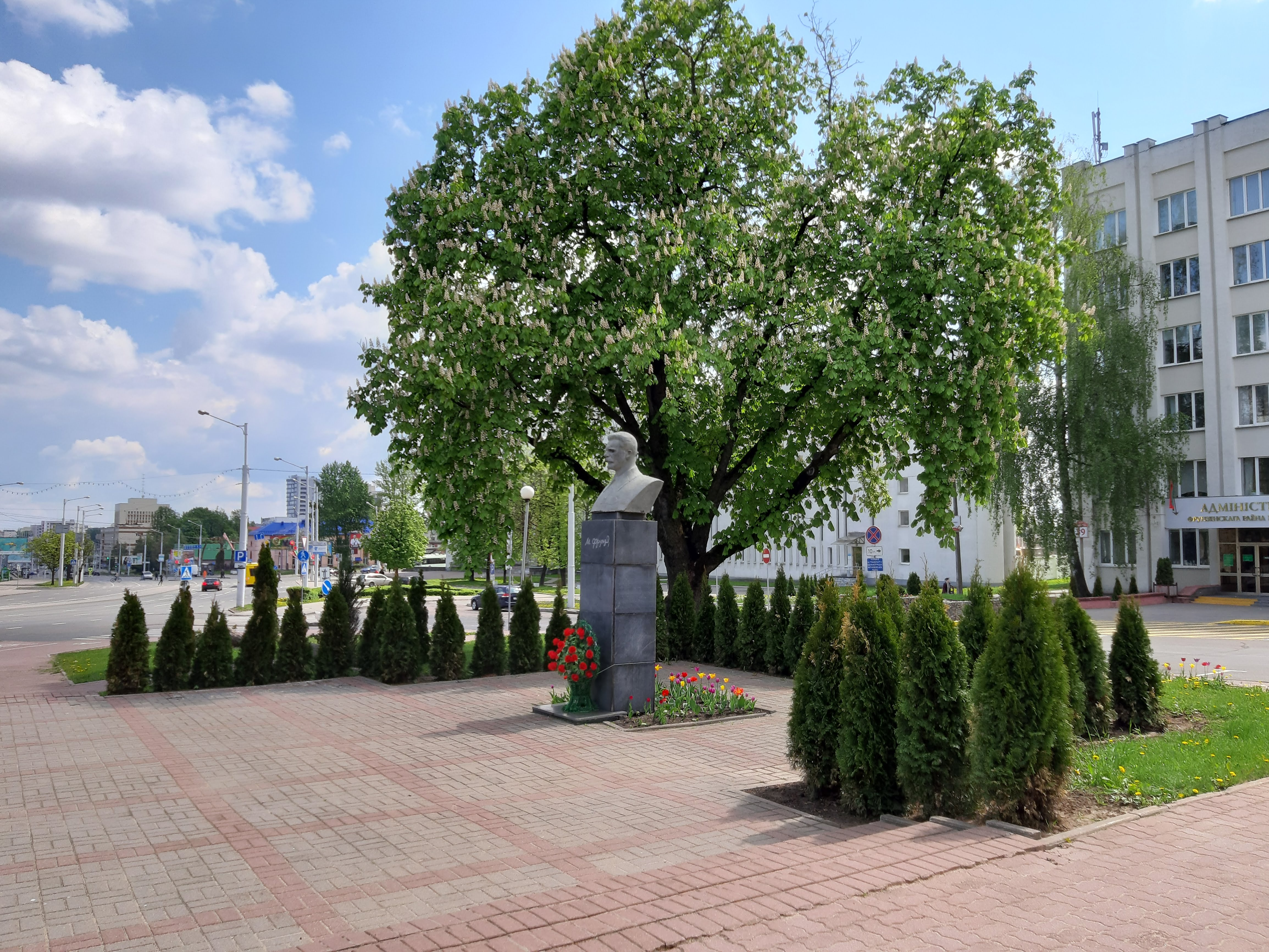 Мінск. Кальварыйскі сквер у 2019